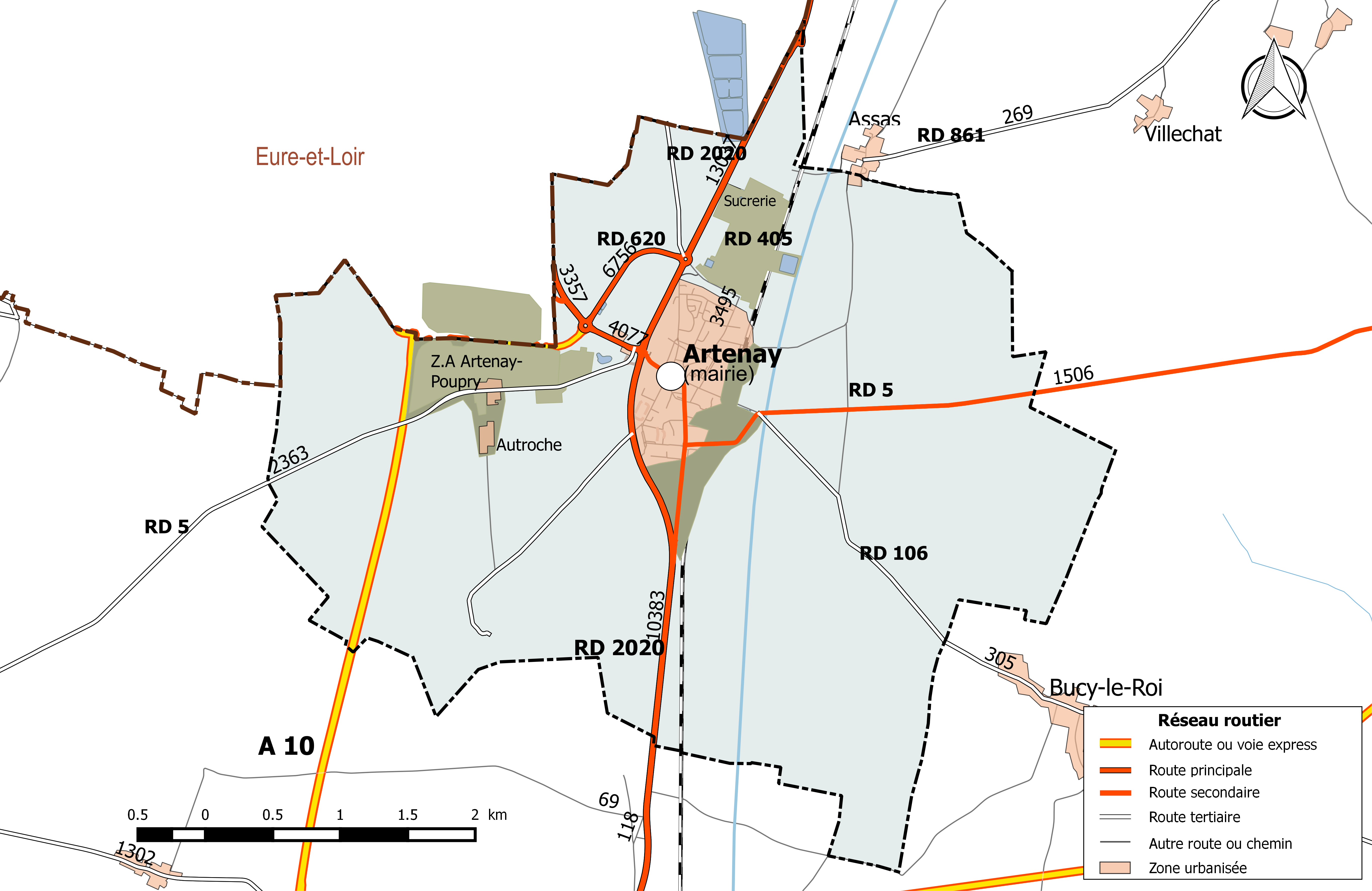 Carte du réseau routier de la commune d'Artenay.